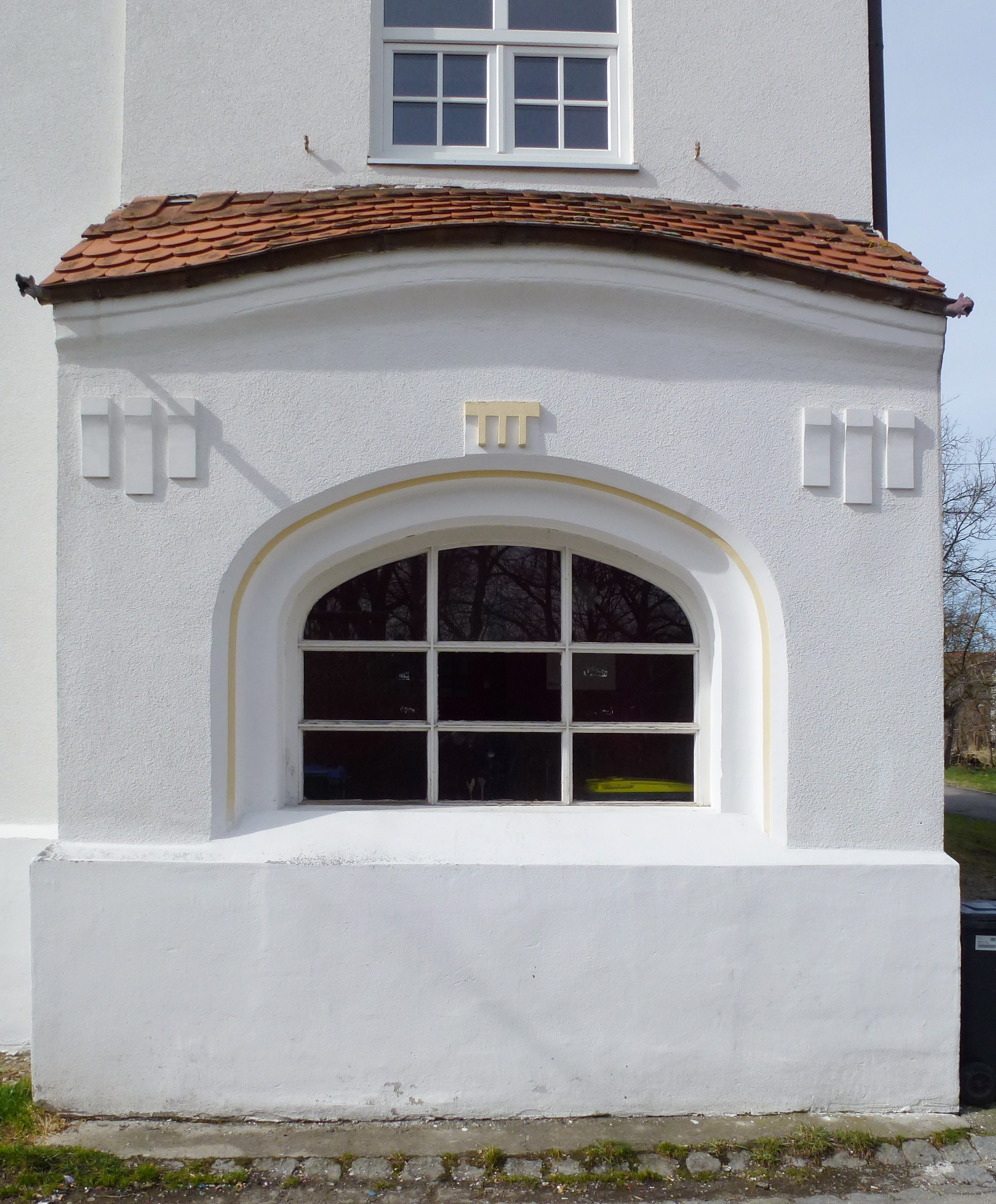 Windach, Raiffeisenweg 4, Schulhaus, Detail Vorbau